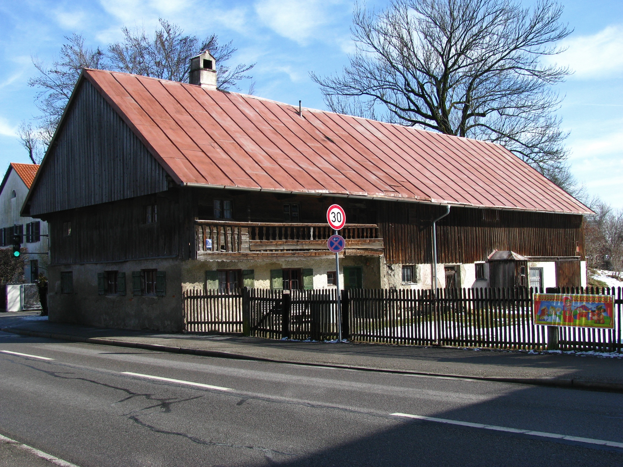 Der denkmalgeschützte Derzbachhof im Münchner Stadtteil Forstenried